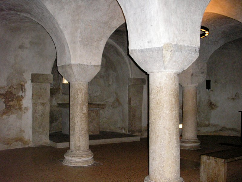 Dom zu Augsburg (Bayerisch-Schwaben). Die romanische Westkrypta. Eigene Aufnahme, März 2007 / Augsburg Cathedral (Bavaria, Germany). The romanesque western crypt. Own photo, March 2007